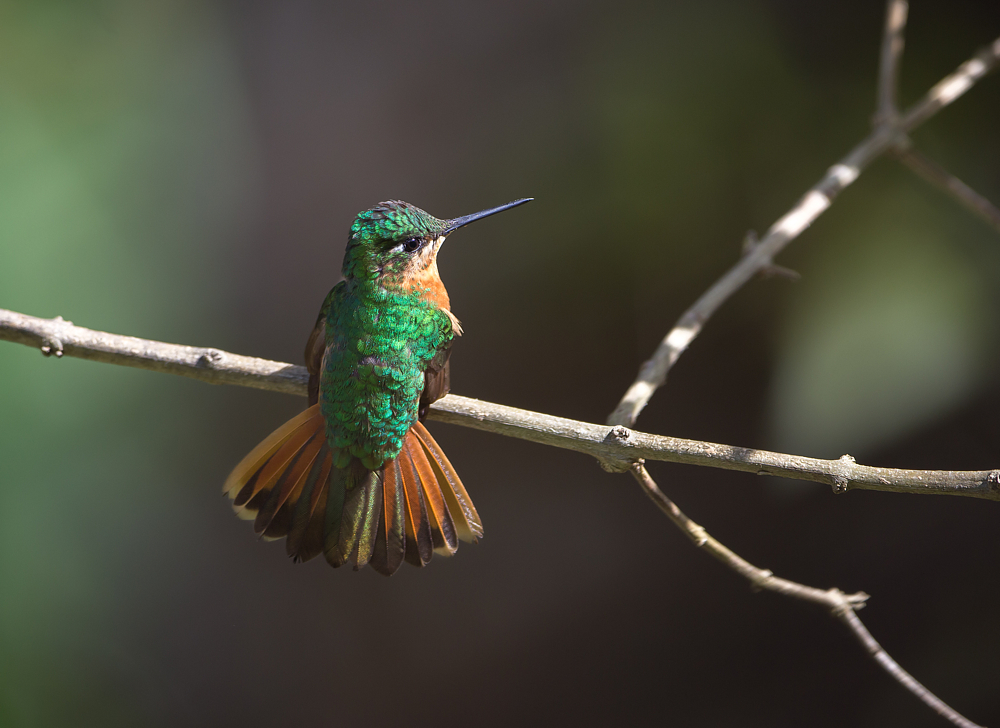 Itatiaia-MG